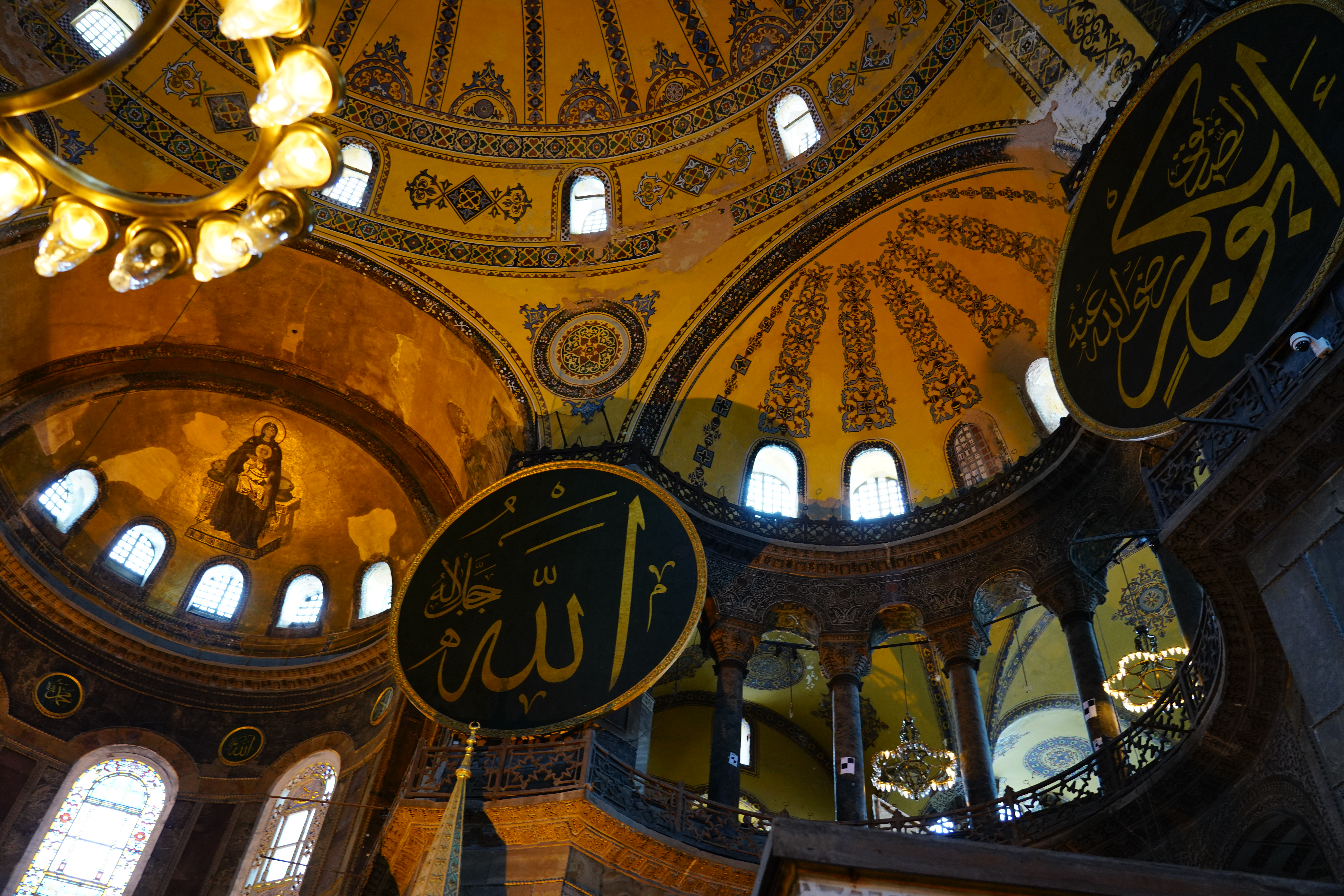 20180114_HagiaSophia_7622